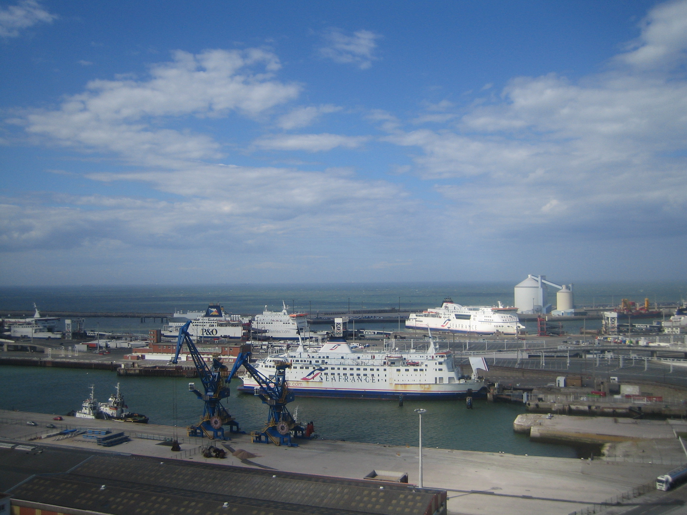 Calais.